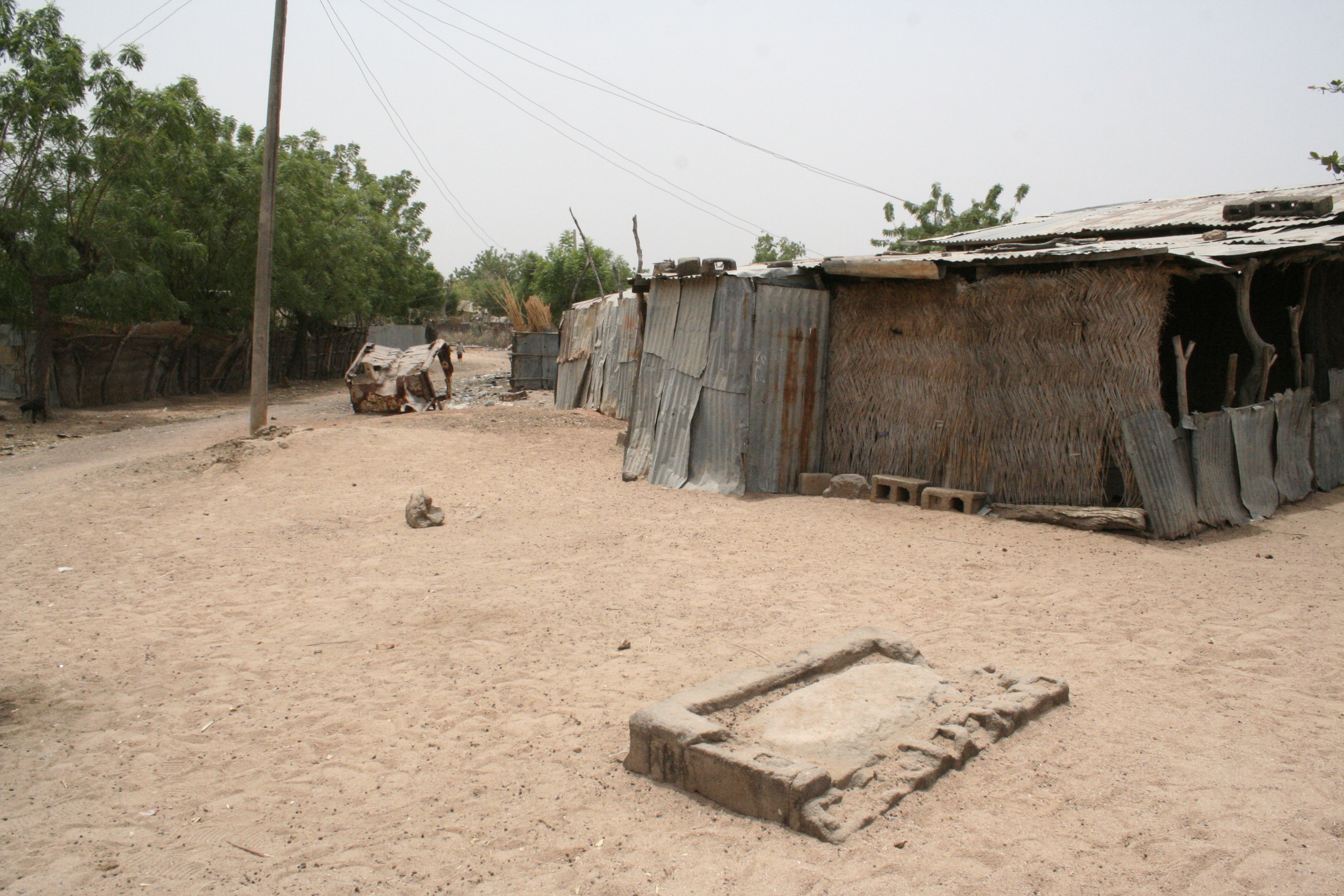 Mogens Uhrenholts grav i Shellem, 2008.